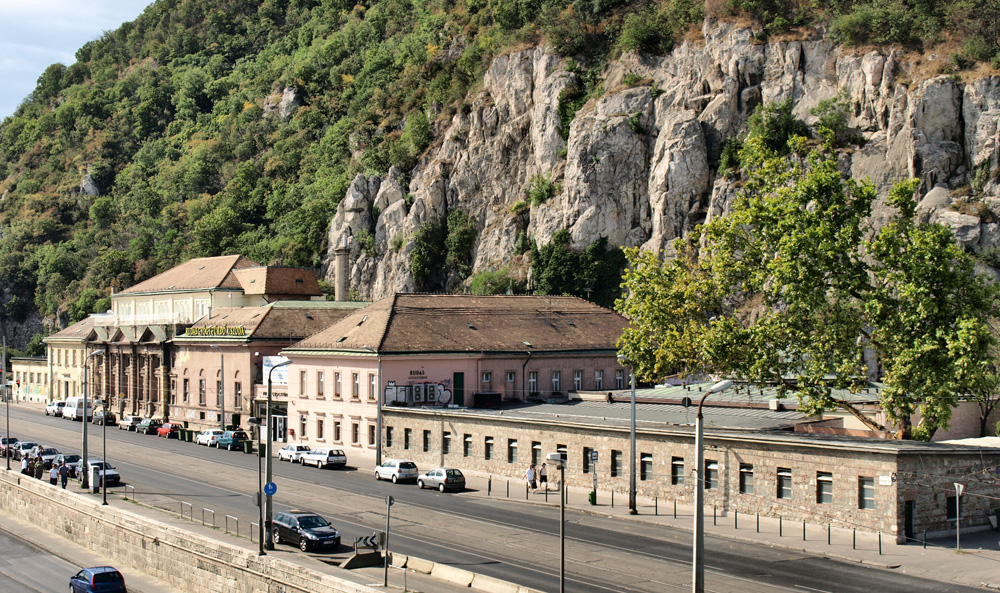 Rudas Gyógyfürdő (Budapest, I. ker., Döbrentei tér, Erzsébet-híd budai oldalánál. Mögötte a Gellért-hegy látható.)